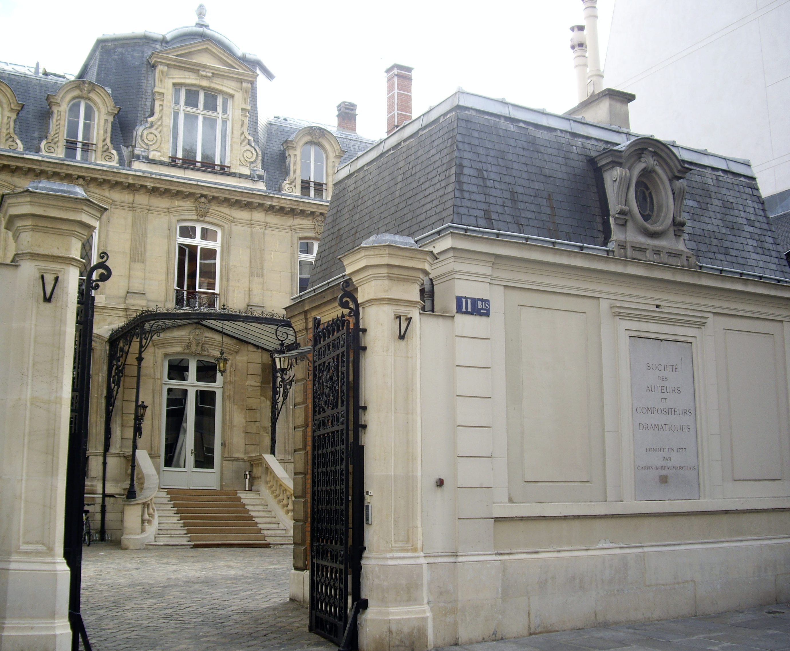 Siège de la Société des auteurs et compositeurs dramatiques, 11 bis rue Ballu, Paris 9e.